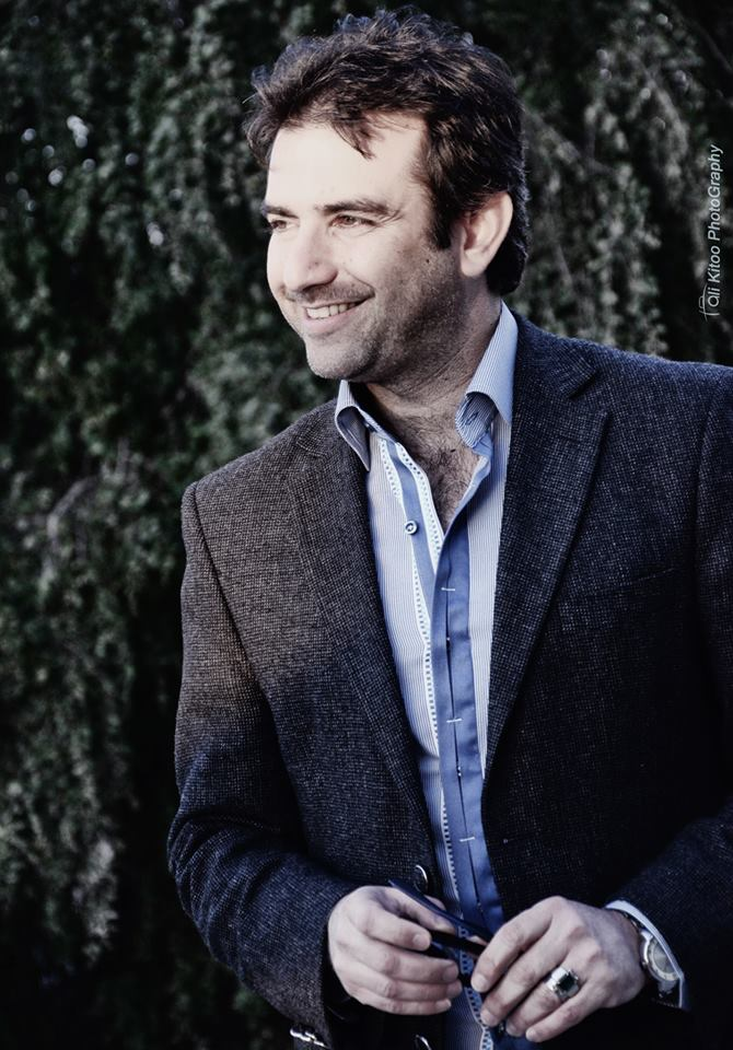 دريد فاضل بعدسة علي كيتو